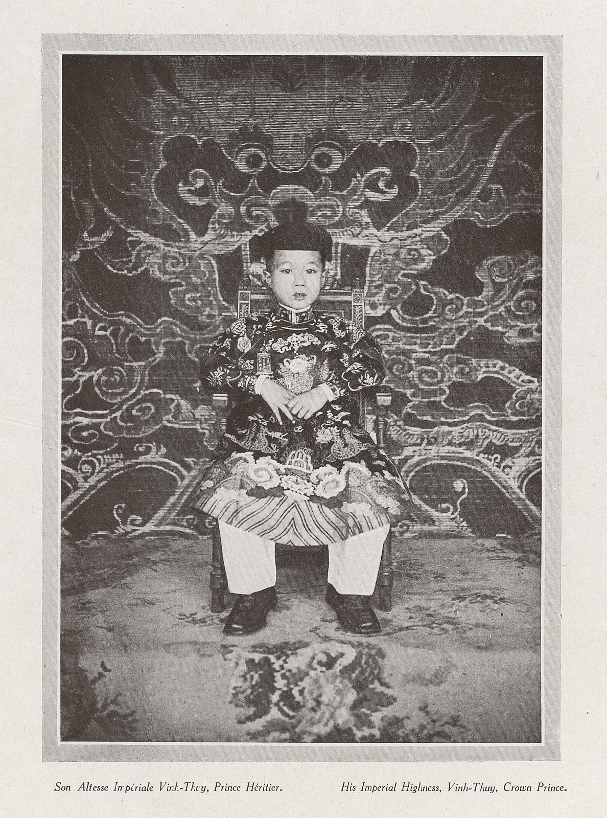 Cesarz Wietnamu Bao Dai w młodości